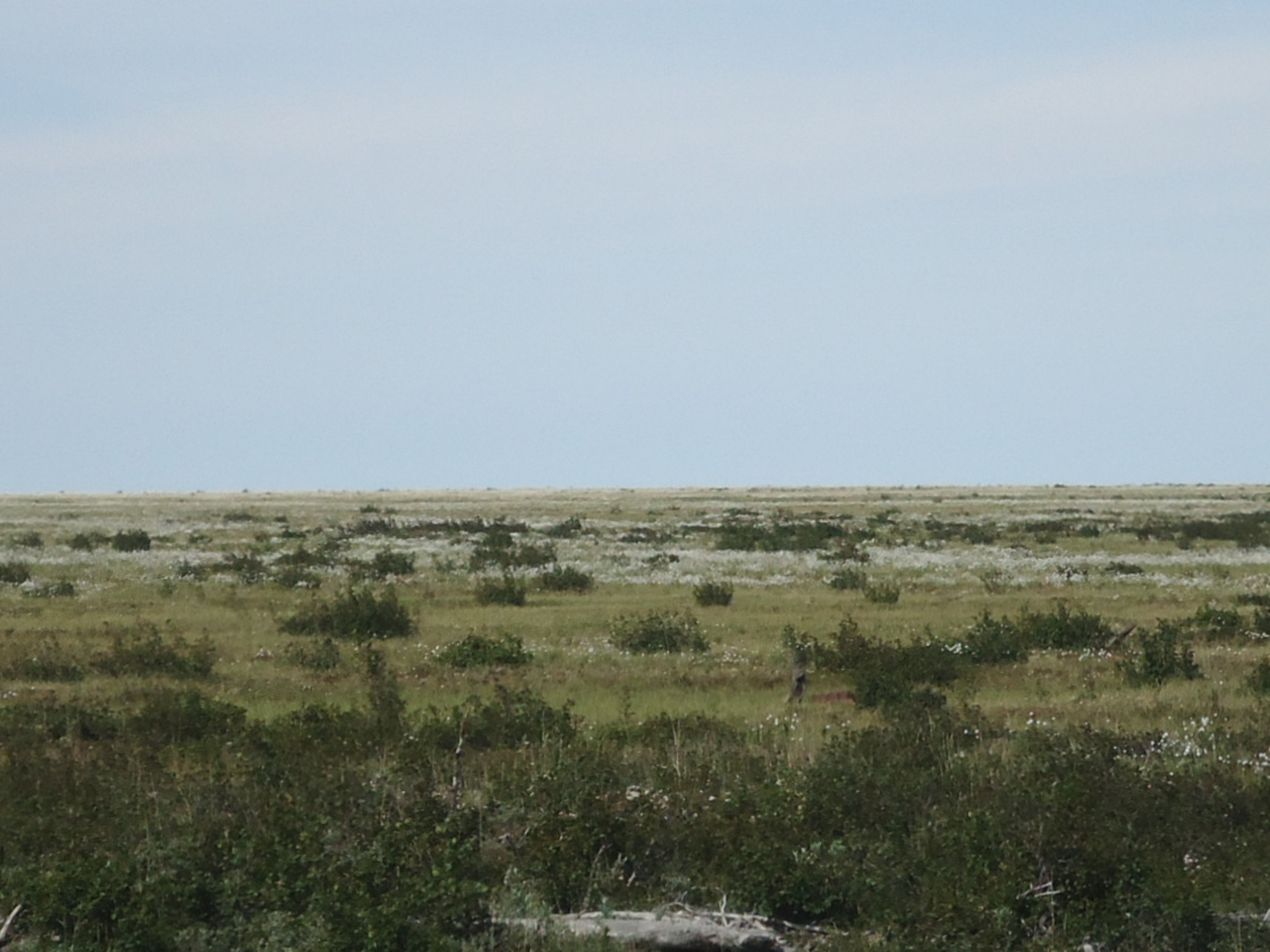 Тундра...цветет